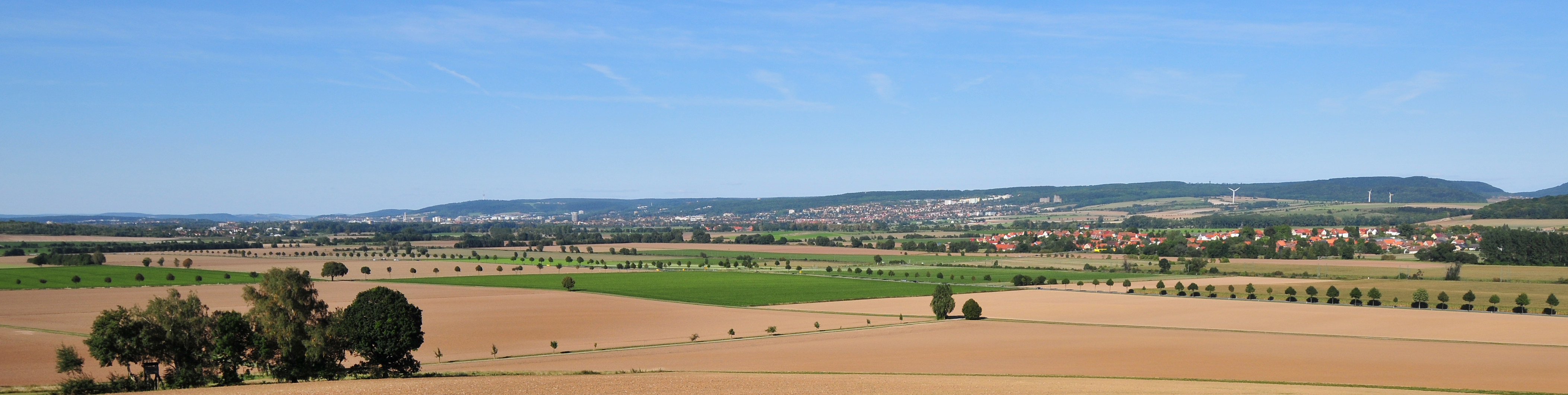 The valley of river Leine between Göttingen and Niedernjesa in Lower Saxony, Germany. de: Der Leinegraben zwischen Göttingen und Niedernjesa in Norddeutschland. Blick in Richtung Nordosten, im Hintergrund der Göttinger Wald, an dessen Hang die oberen Bereiche von Göttingen-Geismar. Der Leinegraben ist eine Niederung im südlichen Niedersachsen. Sie erstreckt sich mit etwa 40 km Länge in ungefähr nord-südlicher Richtung (entsprechend dem Oberrhein als „rheinisch“ bezeichnet) von Einbeck und Markoldendorf über Northeim und Göttingen bis Friedland und wird vom Fluss Leine durchflossen.